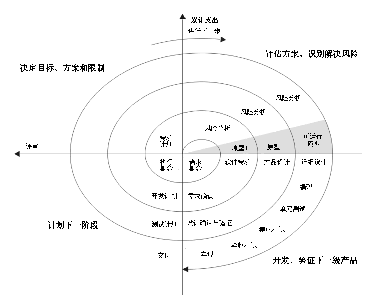 Spiral model (Boehm, 1988), Chinese version